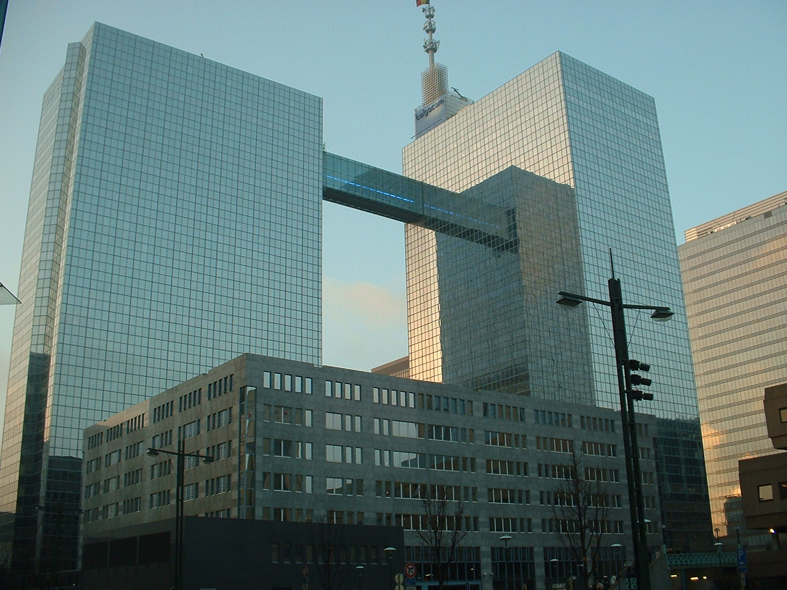 Belgacom building near Gare du Nord Nr. 1Gebäude beim Gare du Nord Nr. 1